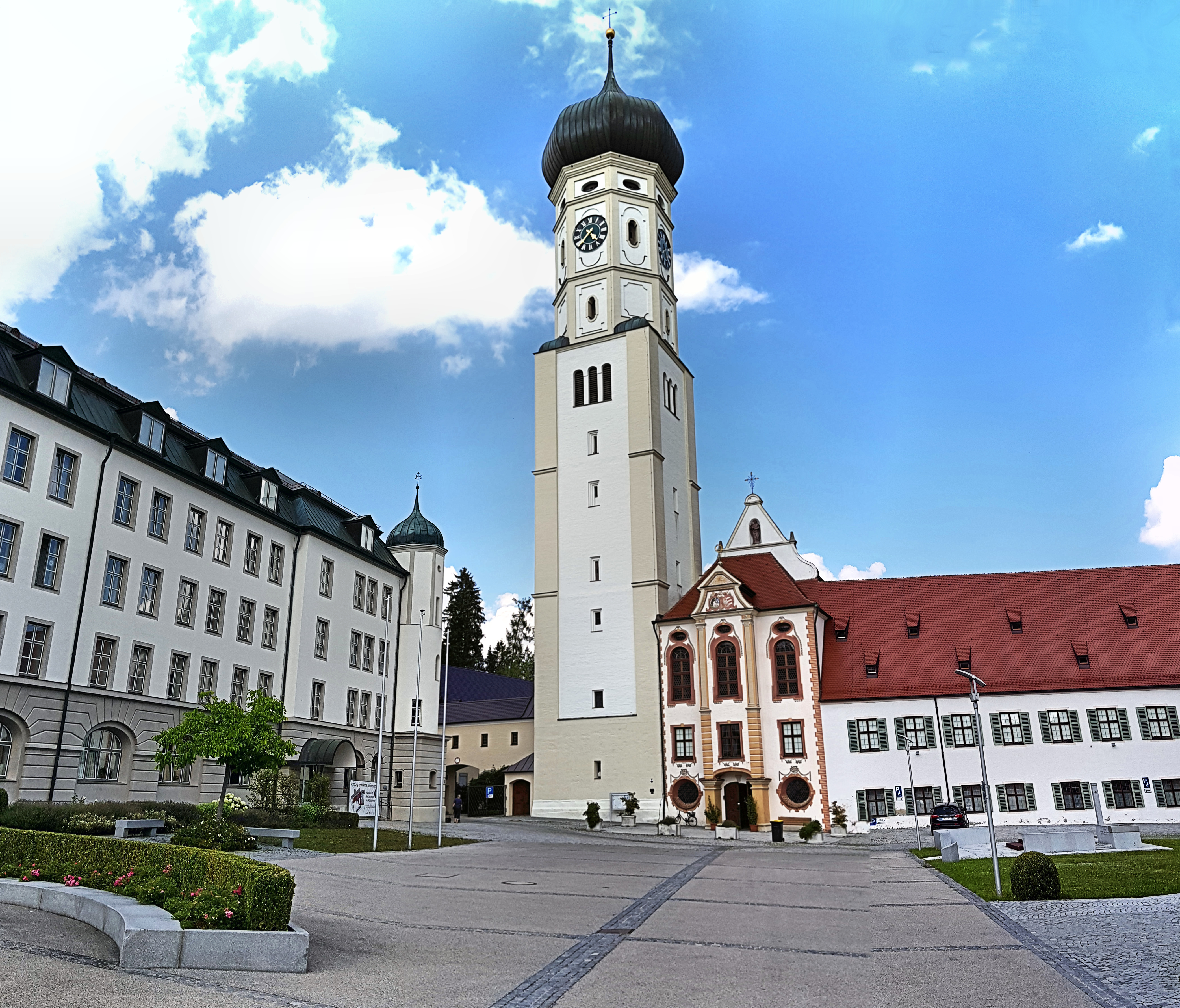 Deutschland, Bayern, Landkreis Günzburg, ehemalige Klosterkirche St. Johannes Evangelist mit angrenzenden Gebäuden